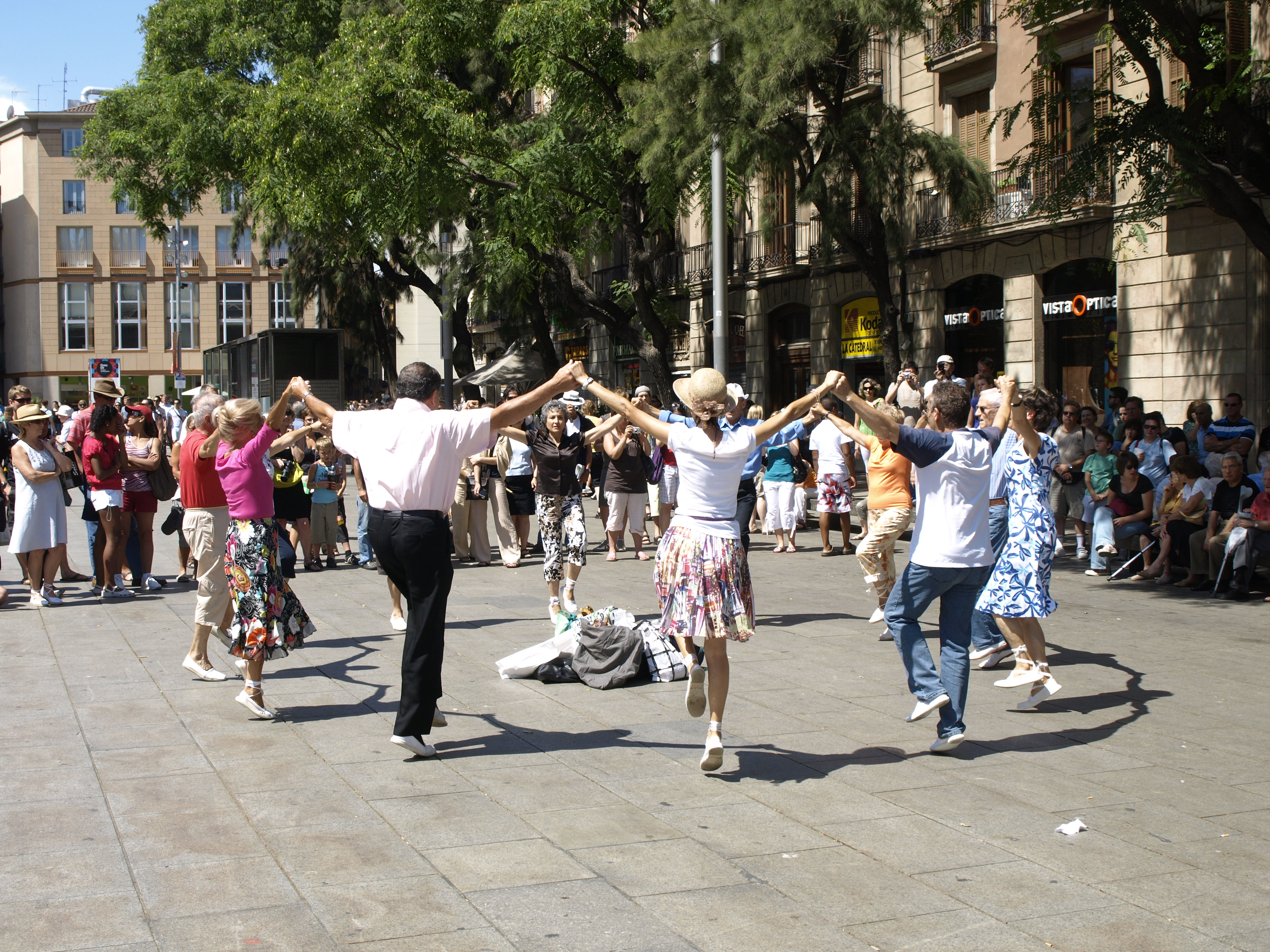 si balla la sardana fuori la cattedrale